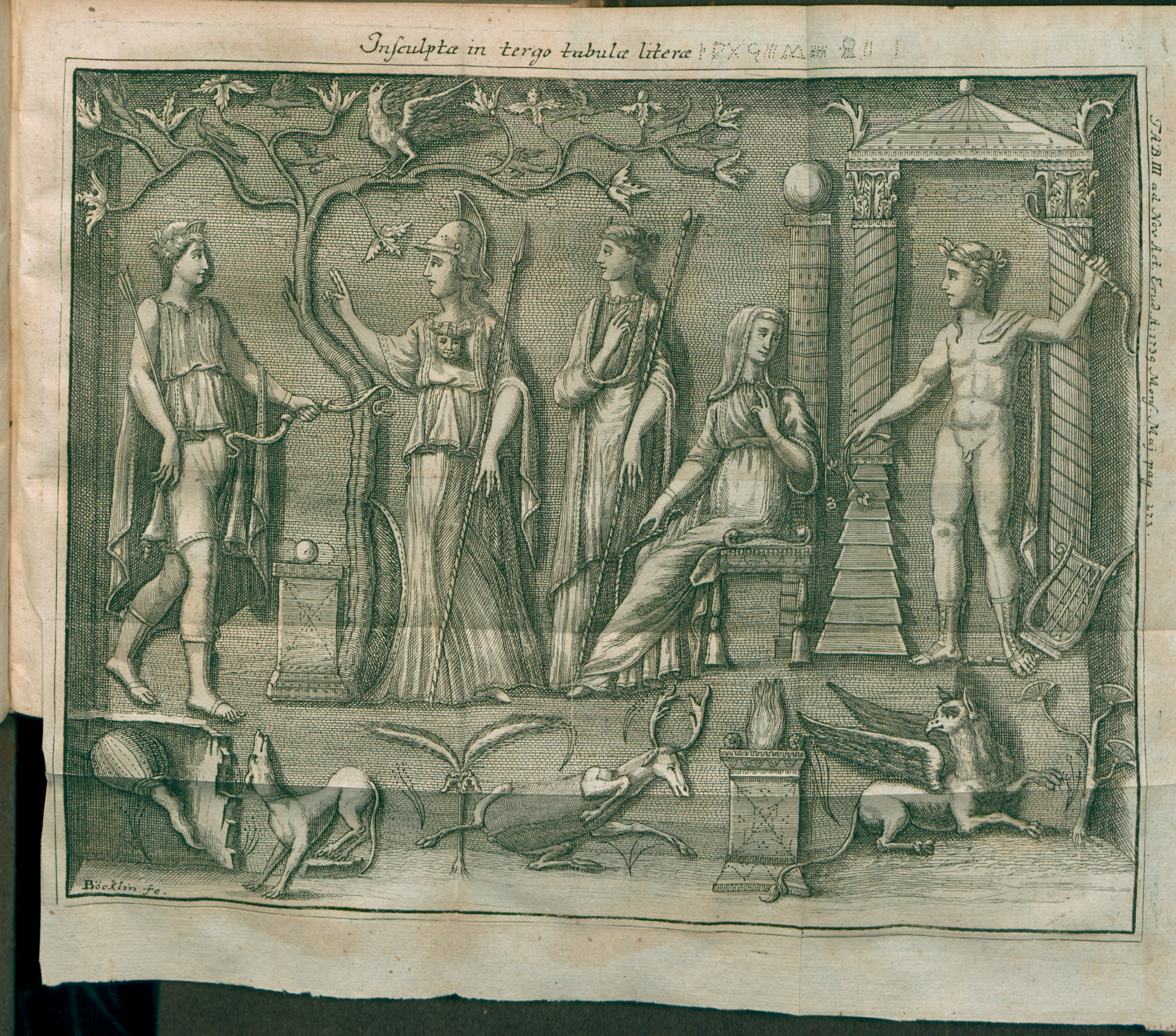 Illustration